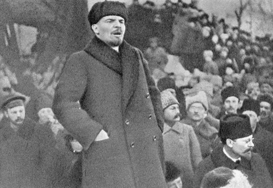 В. И. Ленин на траурном митинге на Красной площади, по­свящённом памяти Я. М. Свердлова.